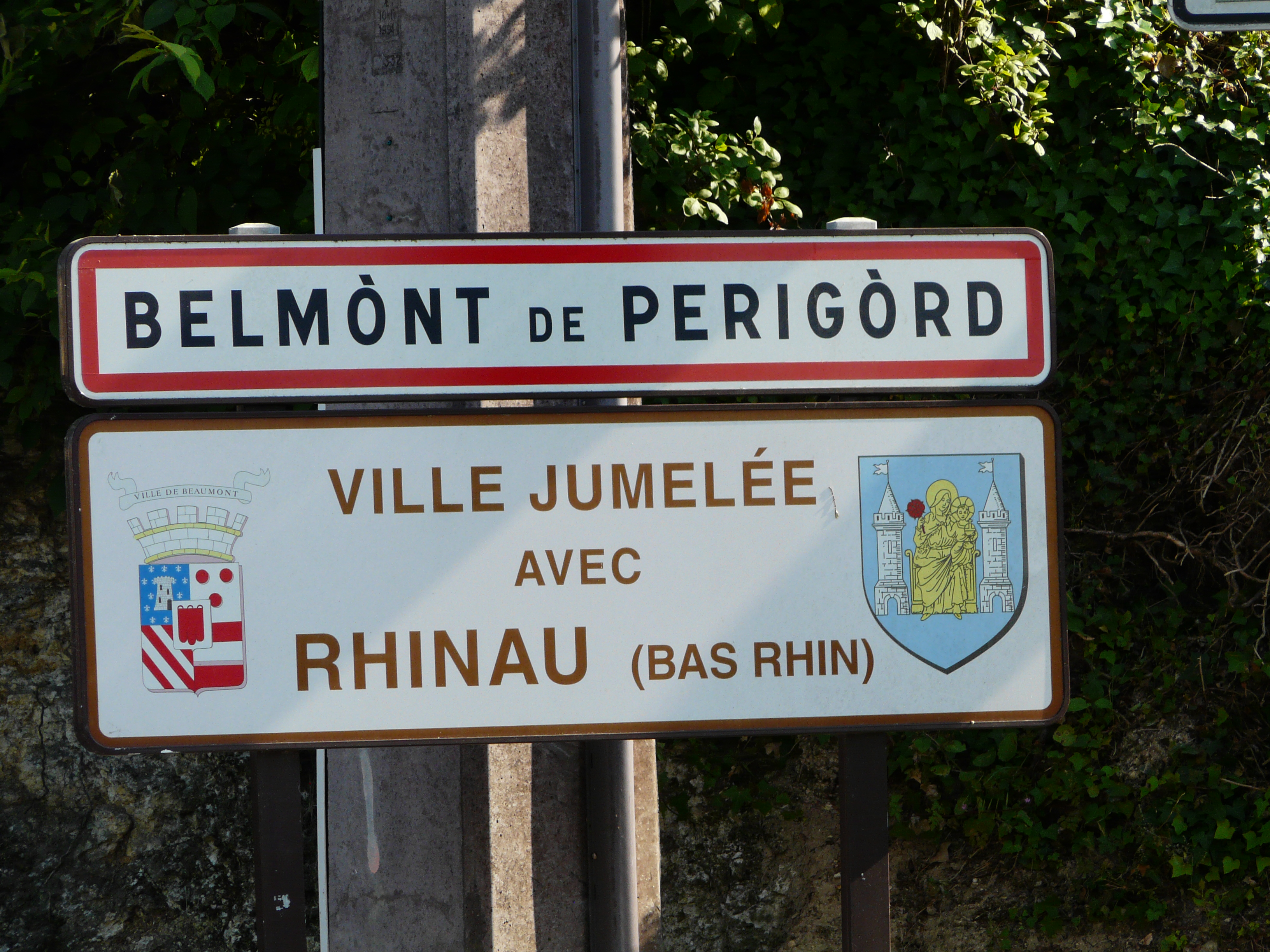 Panneau en occitan, Beaumont-du-Périgord, Dordogne, France.